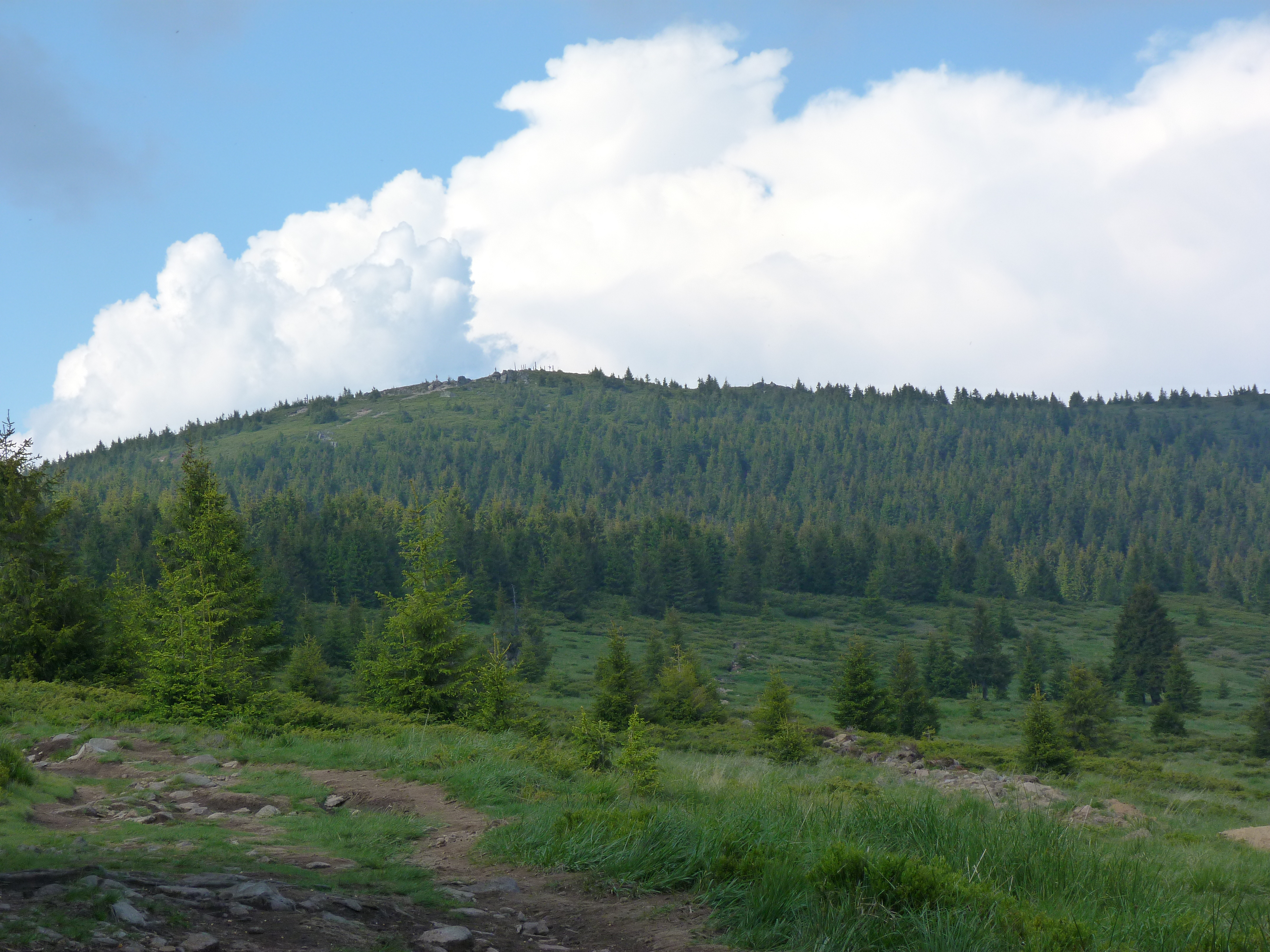 Hargita. The Holy Mountain of the Székely People. The 1801 meter high peak of the Mountain. (Madarasi Hargita). Hargita. A székelyek szent hegye. Az 1801 méter magas hegycsúcs. A felvétel 2013. június 17 -én hétfőn készült. ©© Derzsi Elekes Andor, Budapest, 2013, You are authorised to use these photos and vids under Creative Commons – even for commercial, for profit purposes. Photos must be attributed to Derzsi Elekes Andor. All of the photos and vids in the Metapolisz DVD line are under Creative Commons and can be used even for commercial – for profit – purposes. Recommended Citation Derzsi Elekes Andor: Metapolisz DVD line